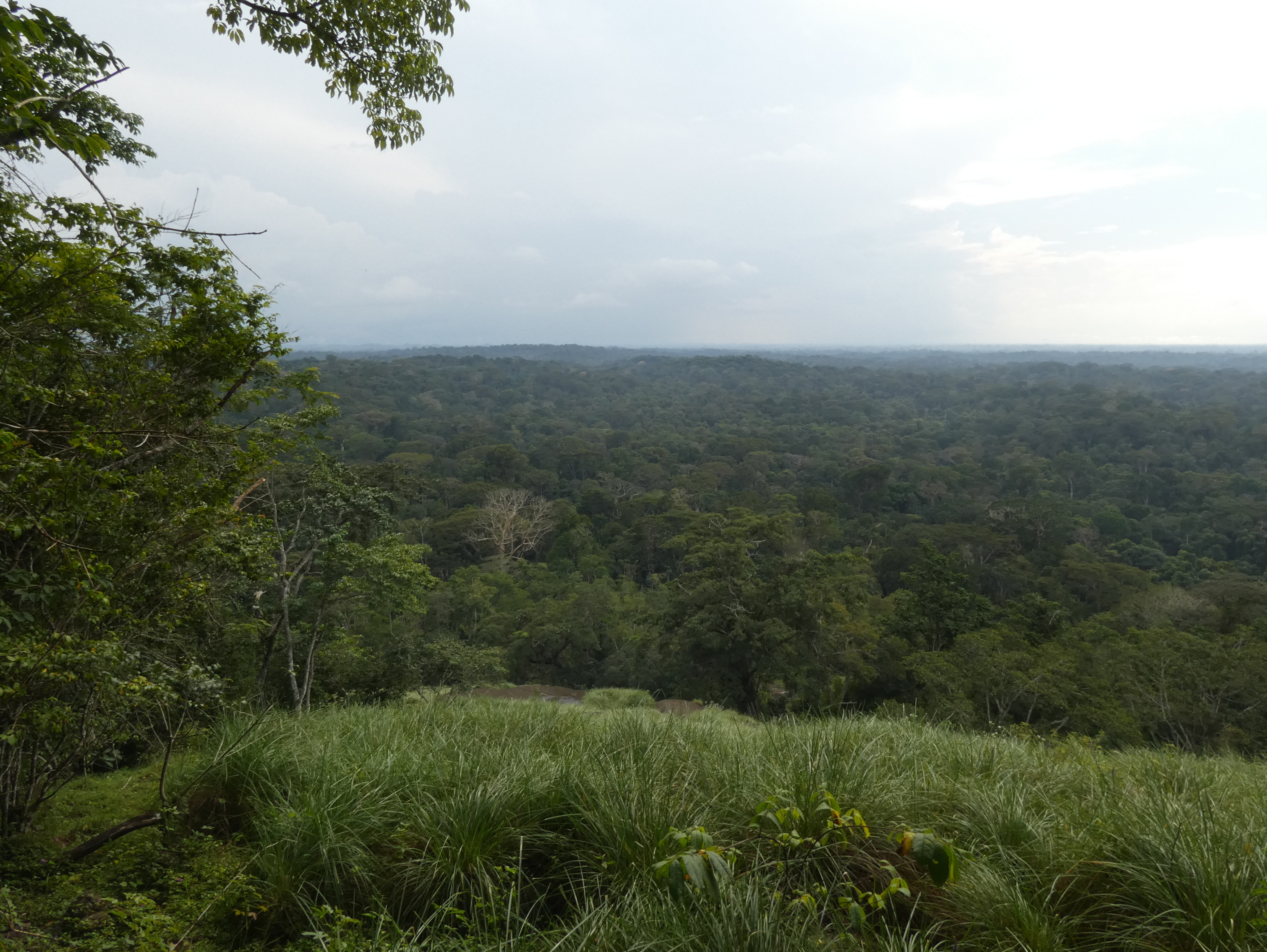 Blick vom Mount Niénokoué im Nationalpark Taï über den Regenwald